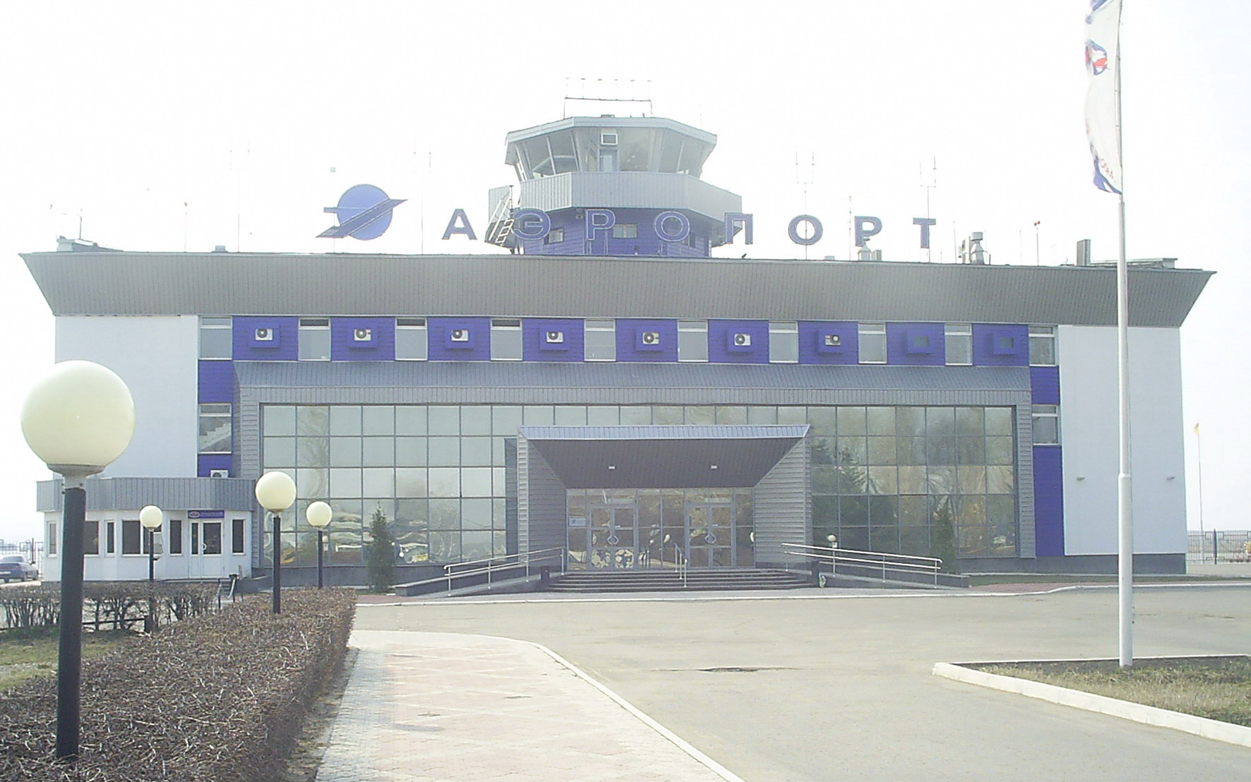 Пензенский Аэропорт. г. Пенза, Первомайский район